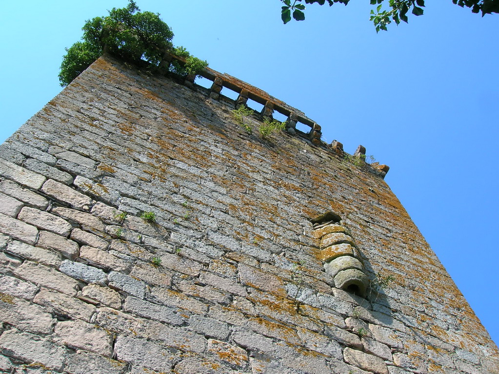 Castelo de Castroverde, Lugo, Espanha